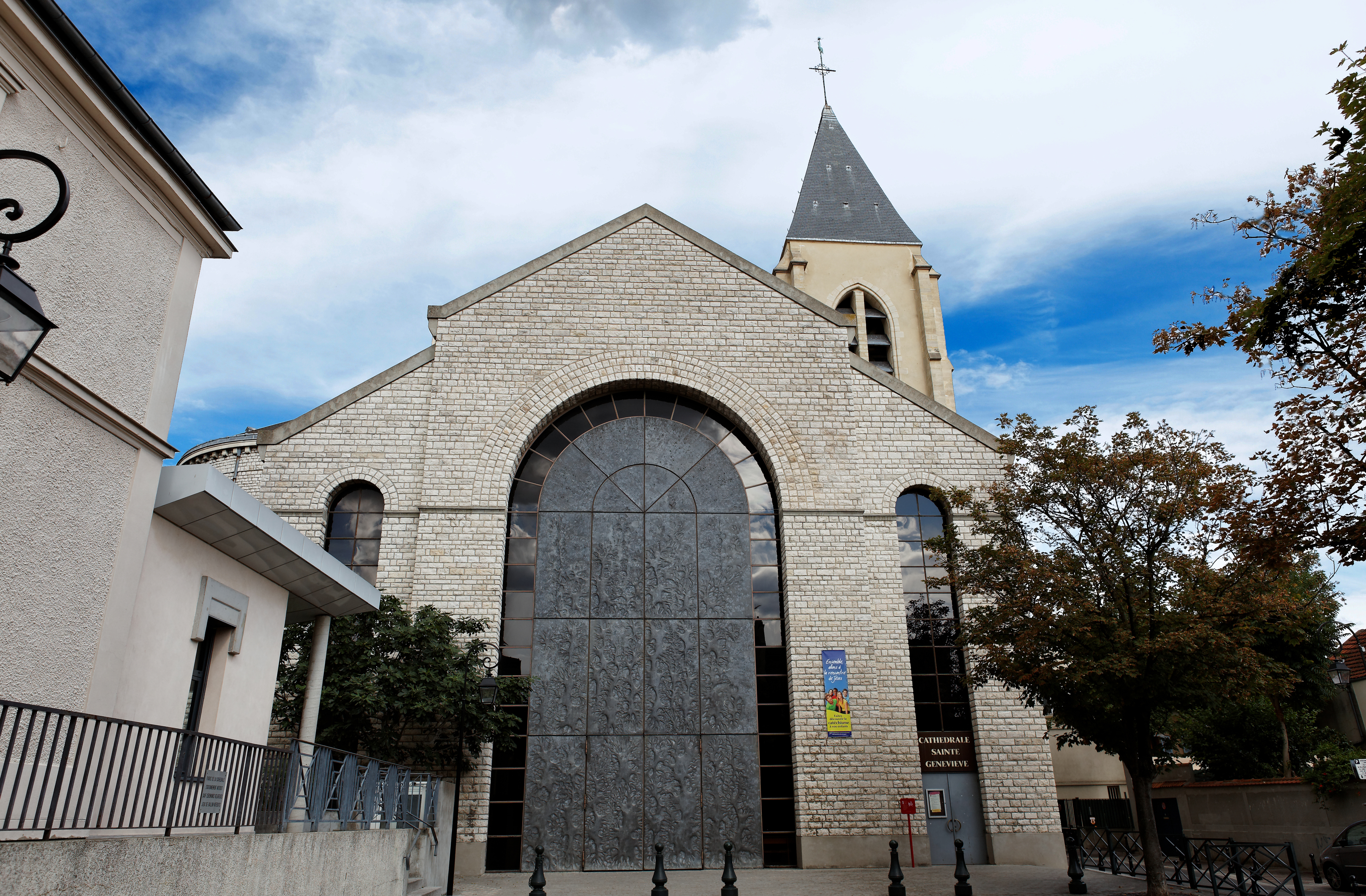 Parvis de la Cathédrale Sainte-Geneviève-et-Saint-Maurice de Nanterre